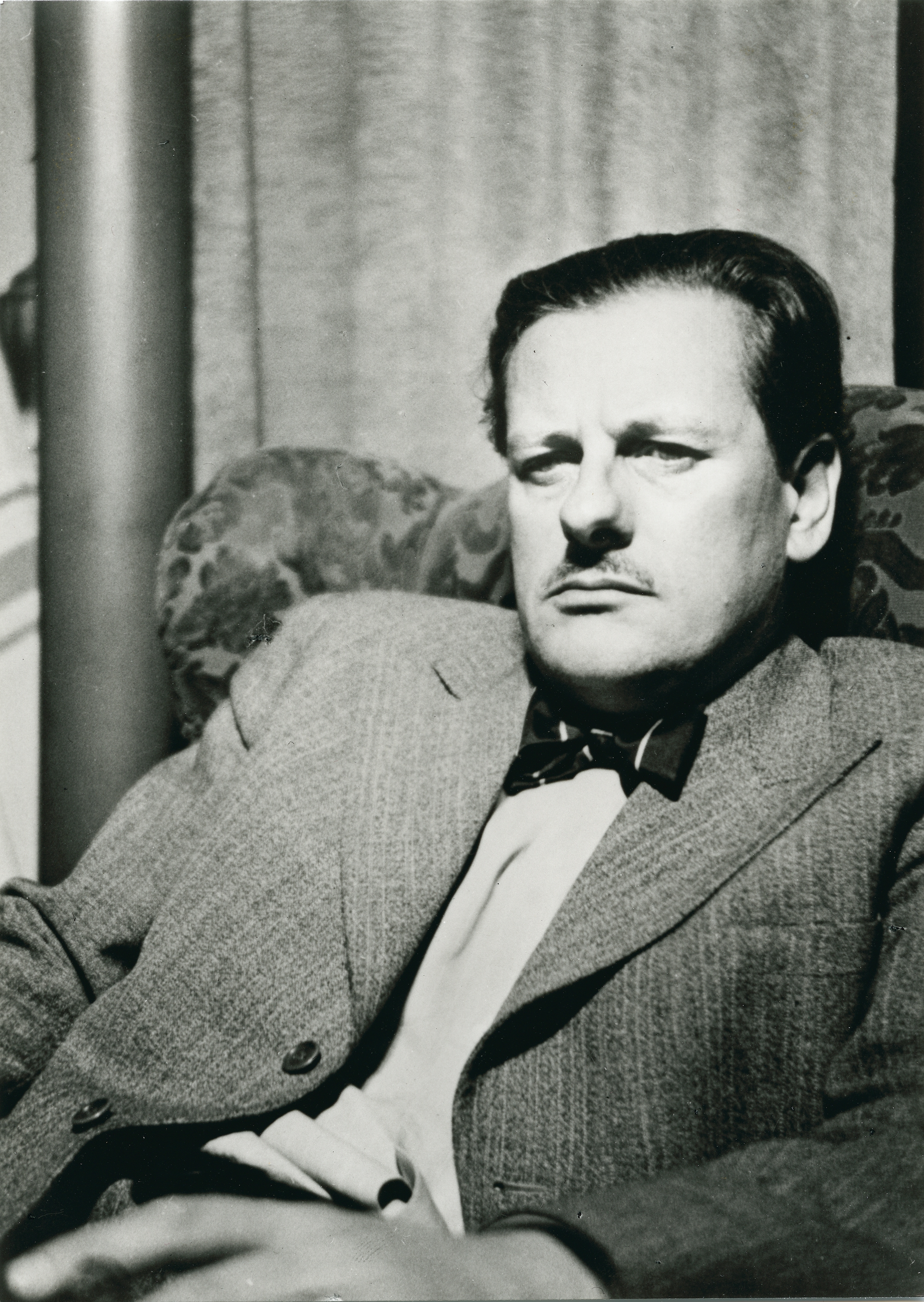 Conny Palm, 1951 (1907-1951)